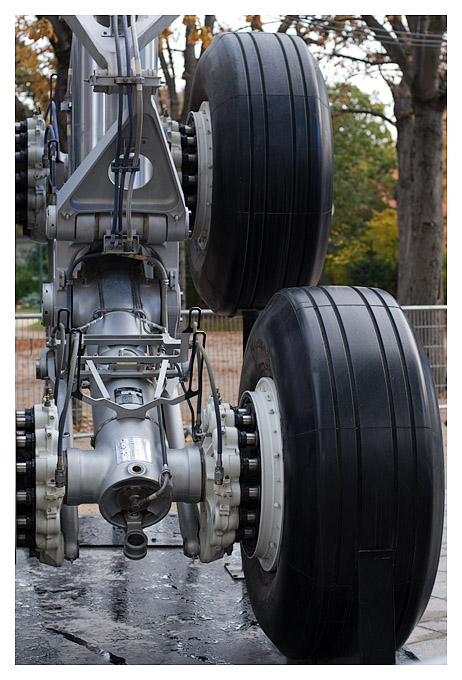 Centenaire du GIFAS à Paris Place de la Concorde Partie basse du train d'atterissage de l'Airbus A340 Fabrication Messier-Downty